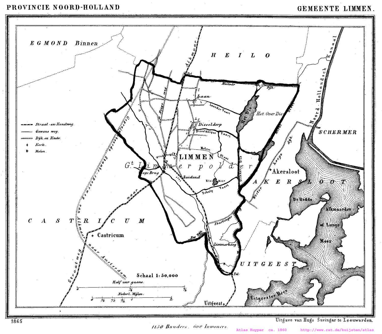 Kaart van Limmen uit Gemeente Atlas van Nederland, J. Kuyper 1865-1870, Uitgave Hugo Suringar Leeuwarden.